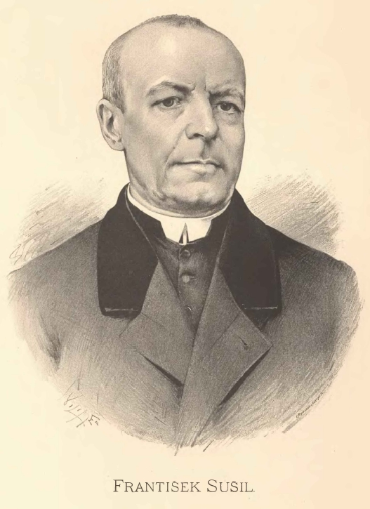 Portréty předních osobností od Jana Vilímka